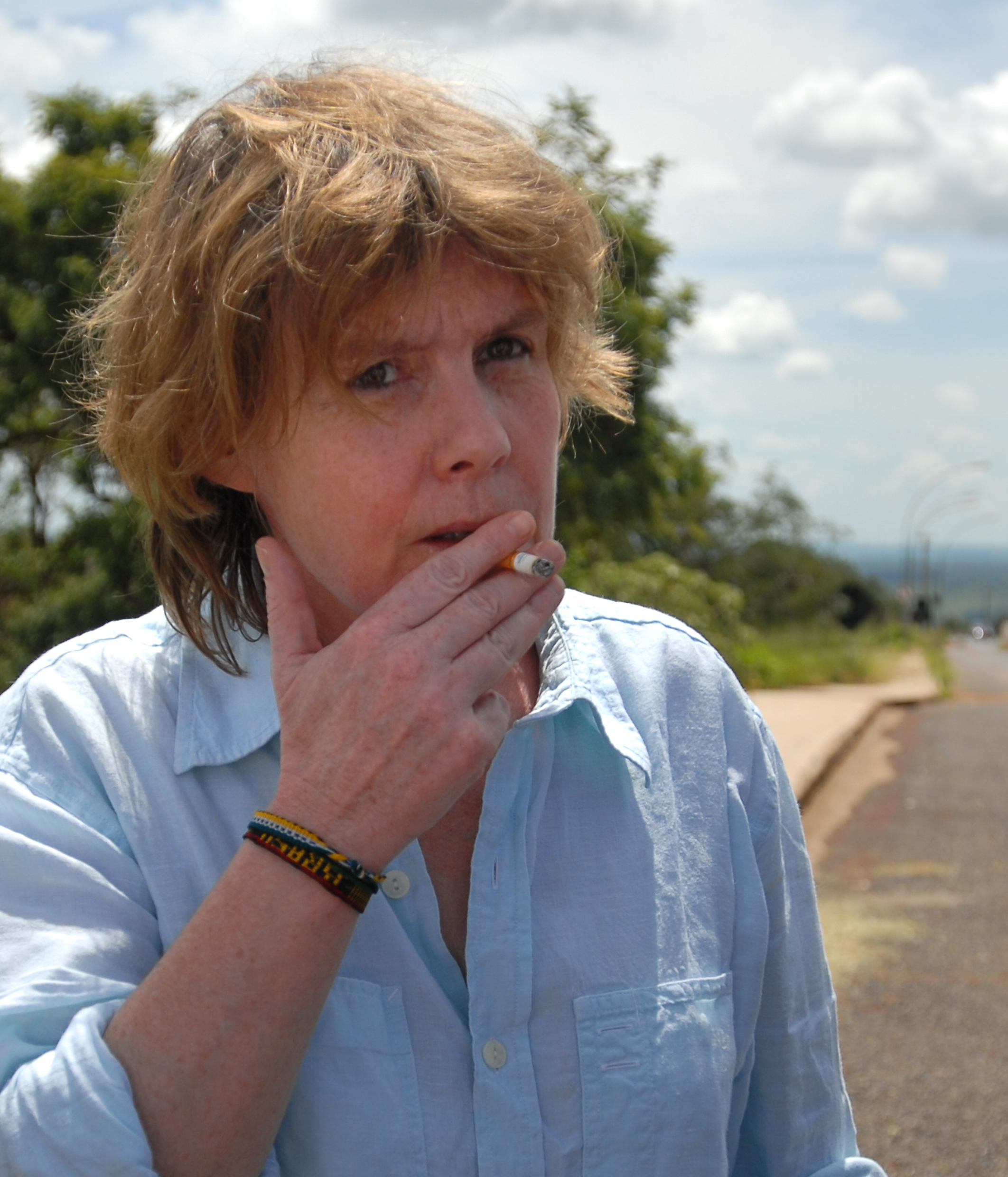 A escritora francesa Fred Vargas.